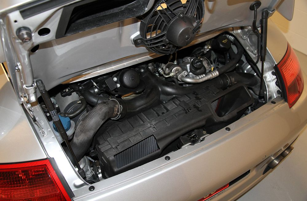 2008 Porsche 911 997 Turbo RUF RT 12